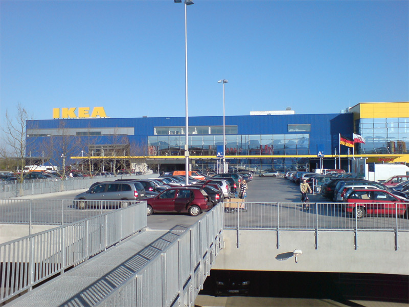 Ikea-Filiale in Frankfurt-Nieder-Eschbach